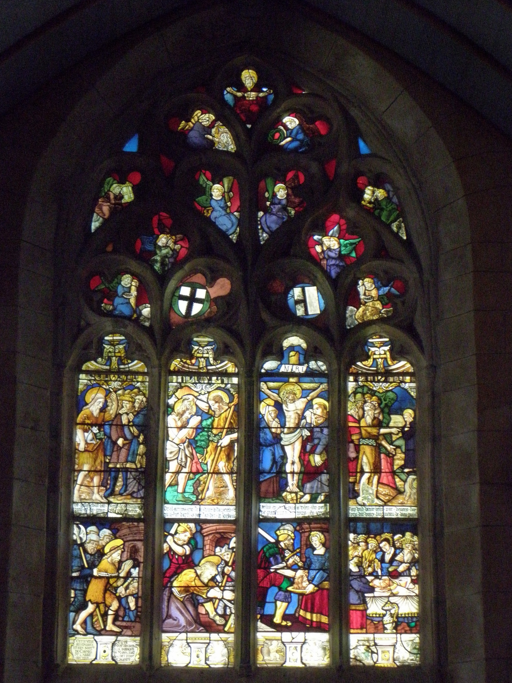 Maîtresse-vitre de l'église Saint-Jean-Baptiste de Le Croisty (56).